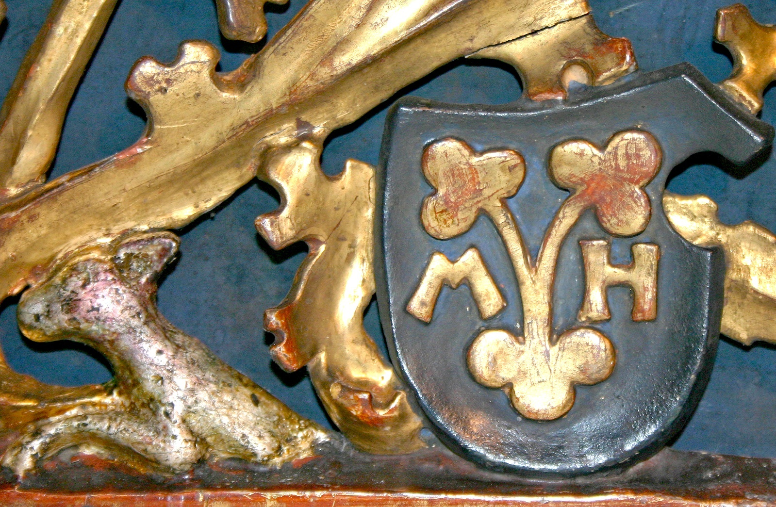 Das Wappen des Bildschnitzers Michael Heuffner, spätgotischer Marienaltar in der Hospitalkirche Hof (1511)